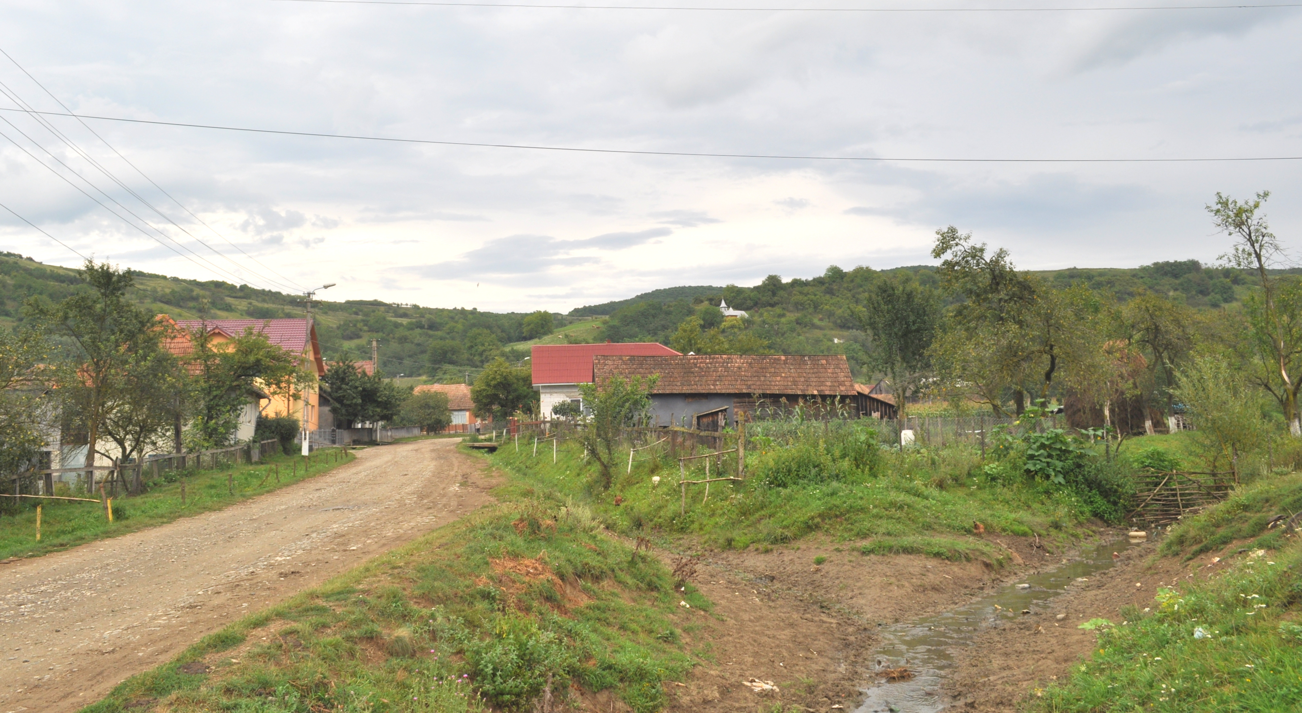 Biserica de lemn „Sfinții Arhangheli” din Manic, județul Bistrița-Năsăud